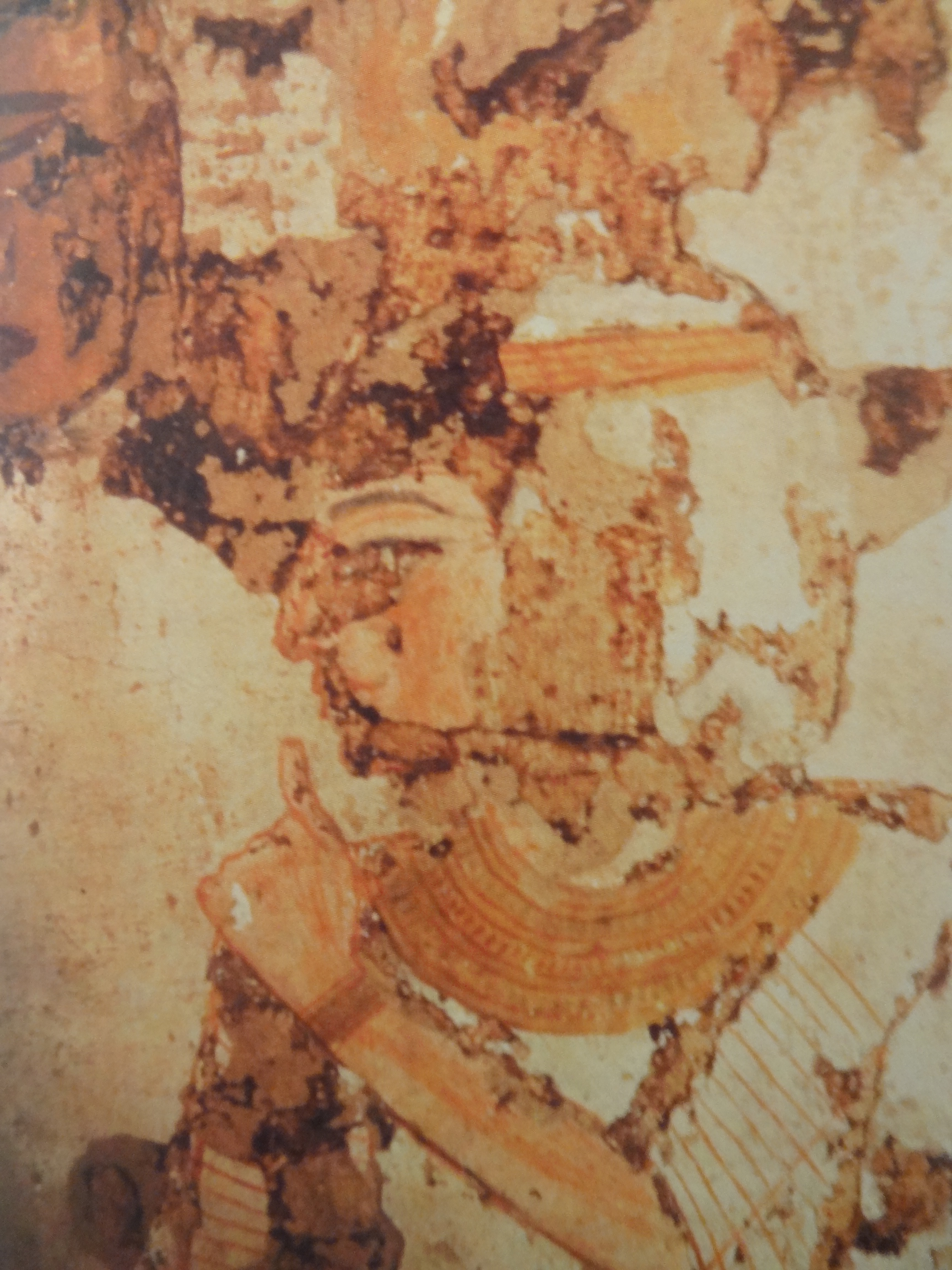 Représentation de Baketourel Ire sur une paroie de l'hypogée d'Amenmen.